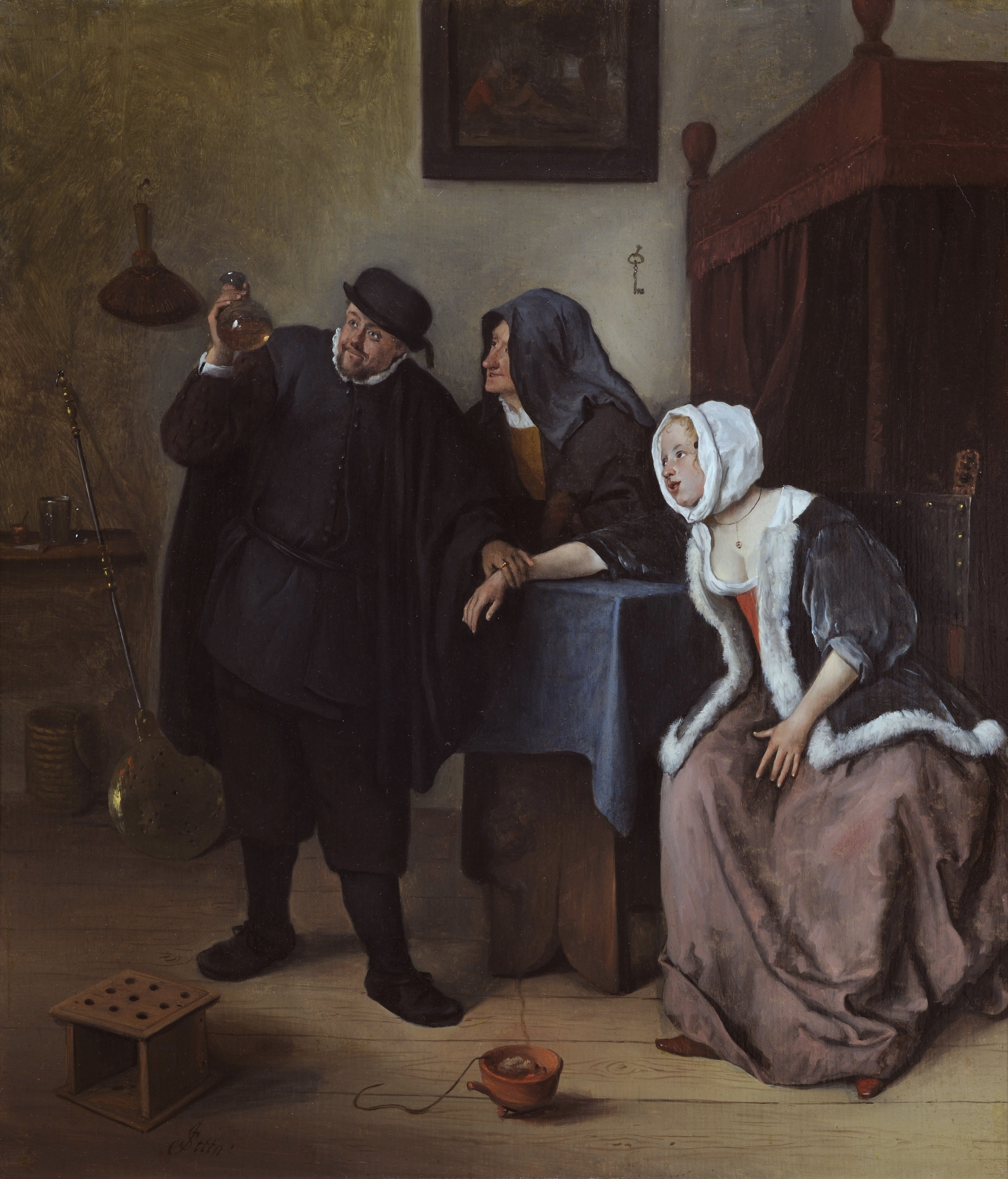 De Piskijker